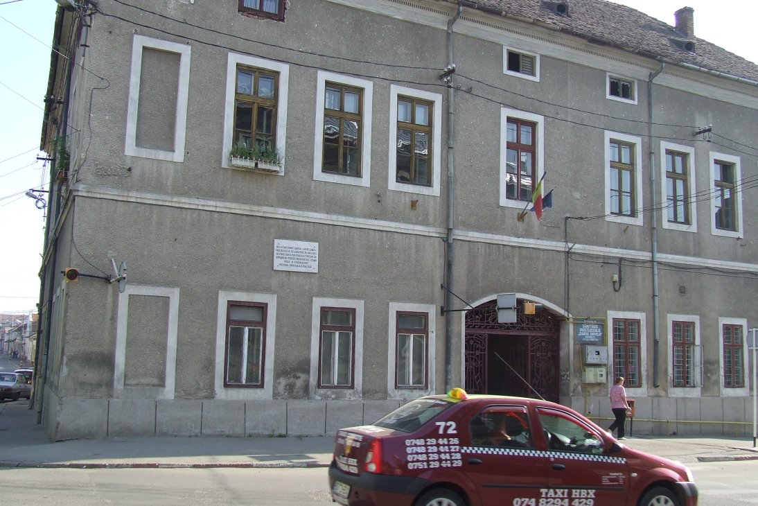 Image from Orăştie, Romania - Ardeleana Bank House